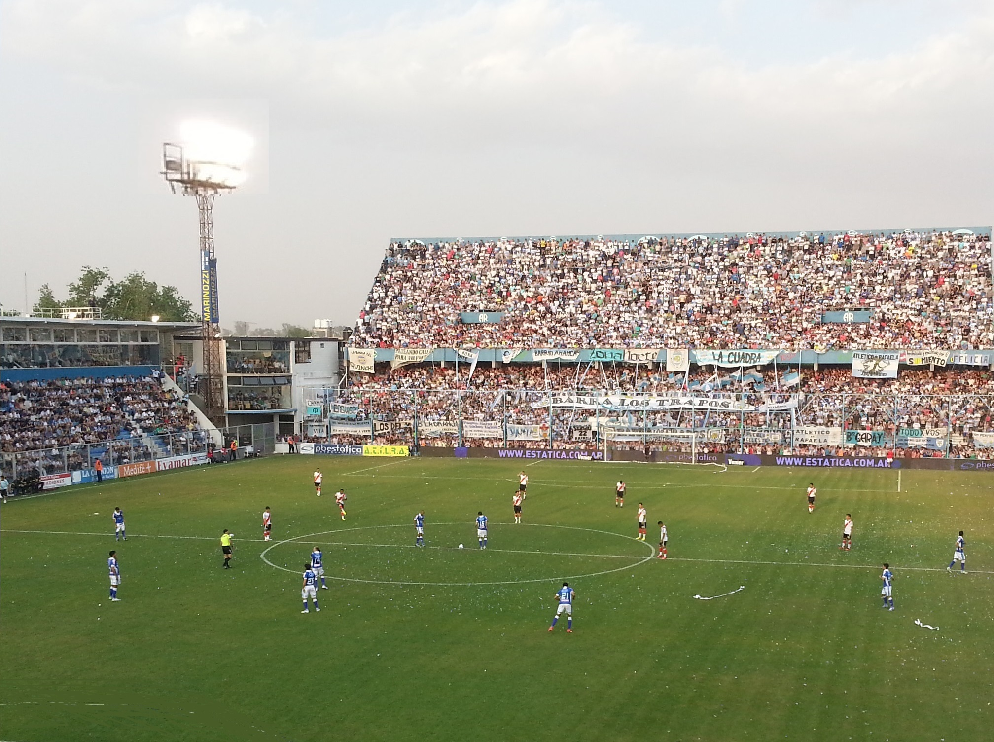 Tribuna popular estadio Nuevo Monumental Atl. Rafaela